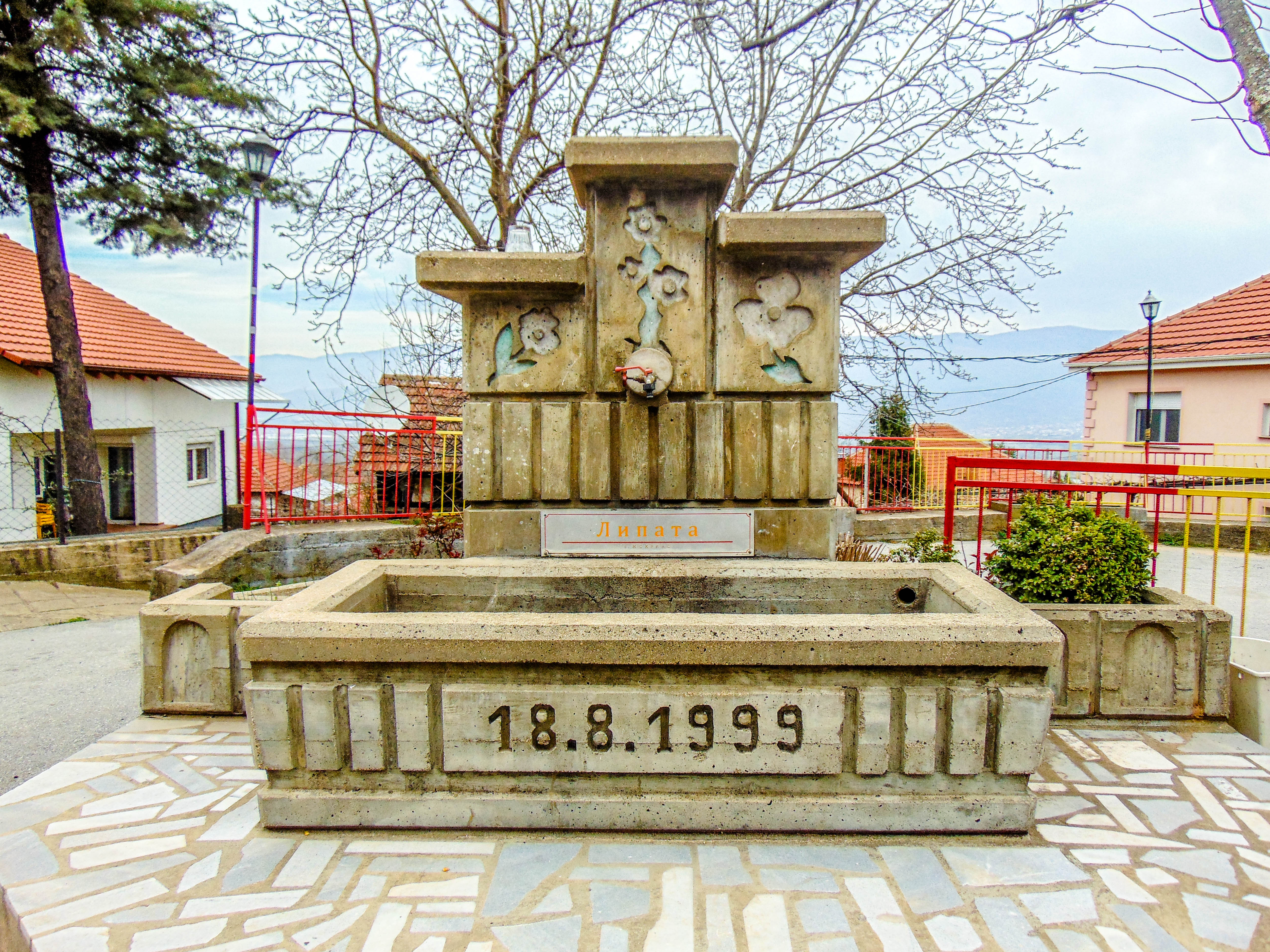 Мокрино